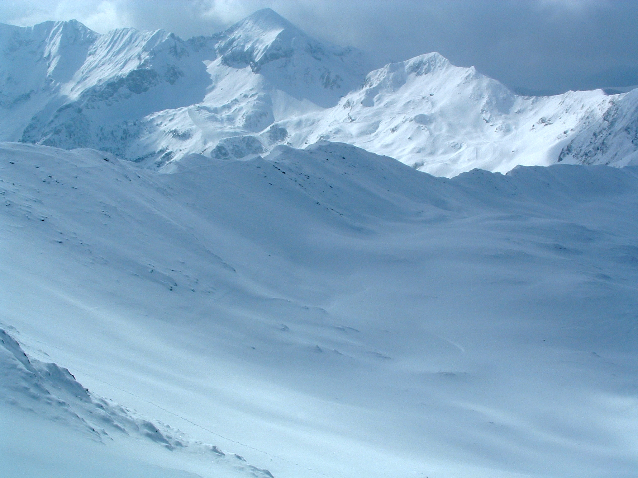 Cime di Lemma, Orobie.